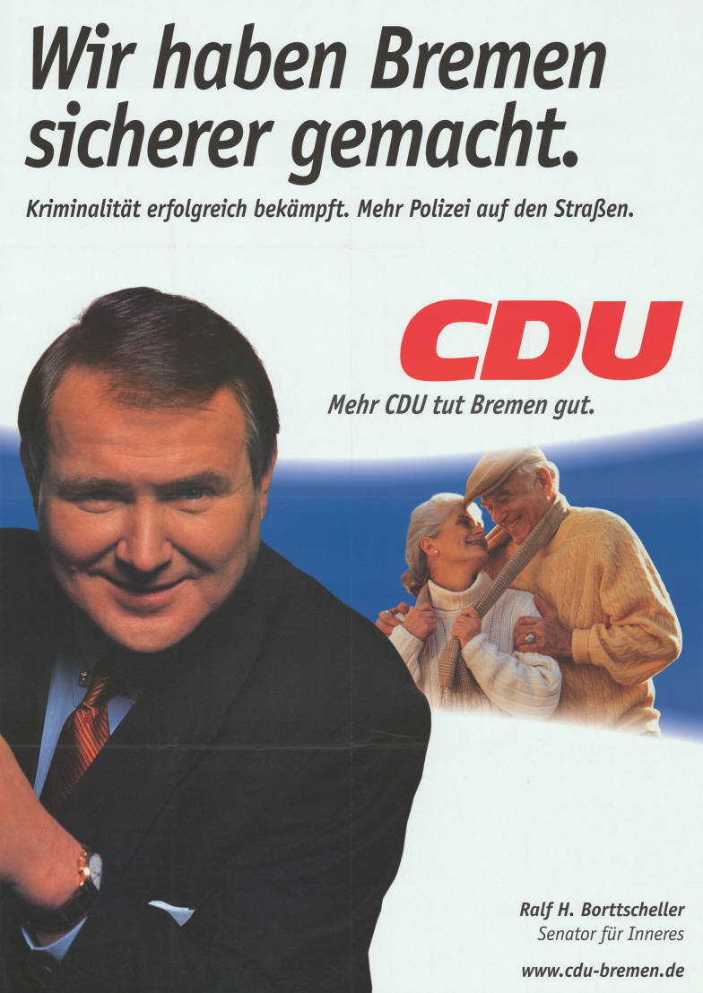 Wir haben Bremen sicherer gemacht Kriminalität erfolgreich bekämpft. Mehr Polizei auf den Straßen. CDU Mehr CDU tut Bremen gut. Ralf H. Borttscheller Senator für Inneres Abbildung: Foto vor glücklichem Rentnerehepaar Plakatart: Kandidaten-/Personenplakat mit Porträt Objekt-Signatur: 10-005 : 1004 Bestand: Plakate zu Bürgerschaftswahlen Bremen (10-005) GliederungBestand10-18: Plakate zu Bürgerschaftswahlen Bremen (10-005) » CDU Lizenz: KAS/ACDP 10-005 : 1004 CC-BY-SA 3.0 DE